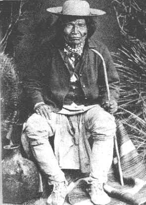 Nana chef de guerre Apache